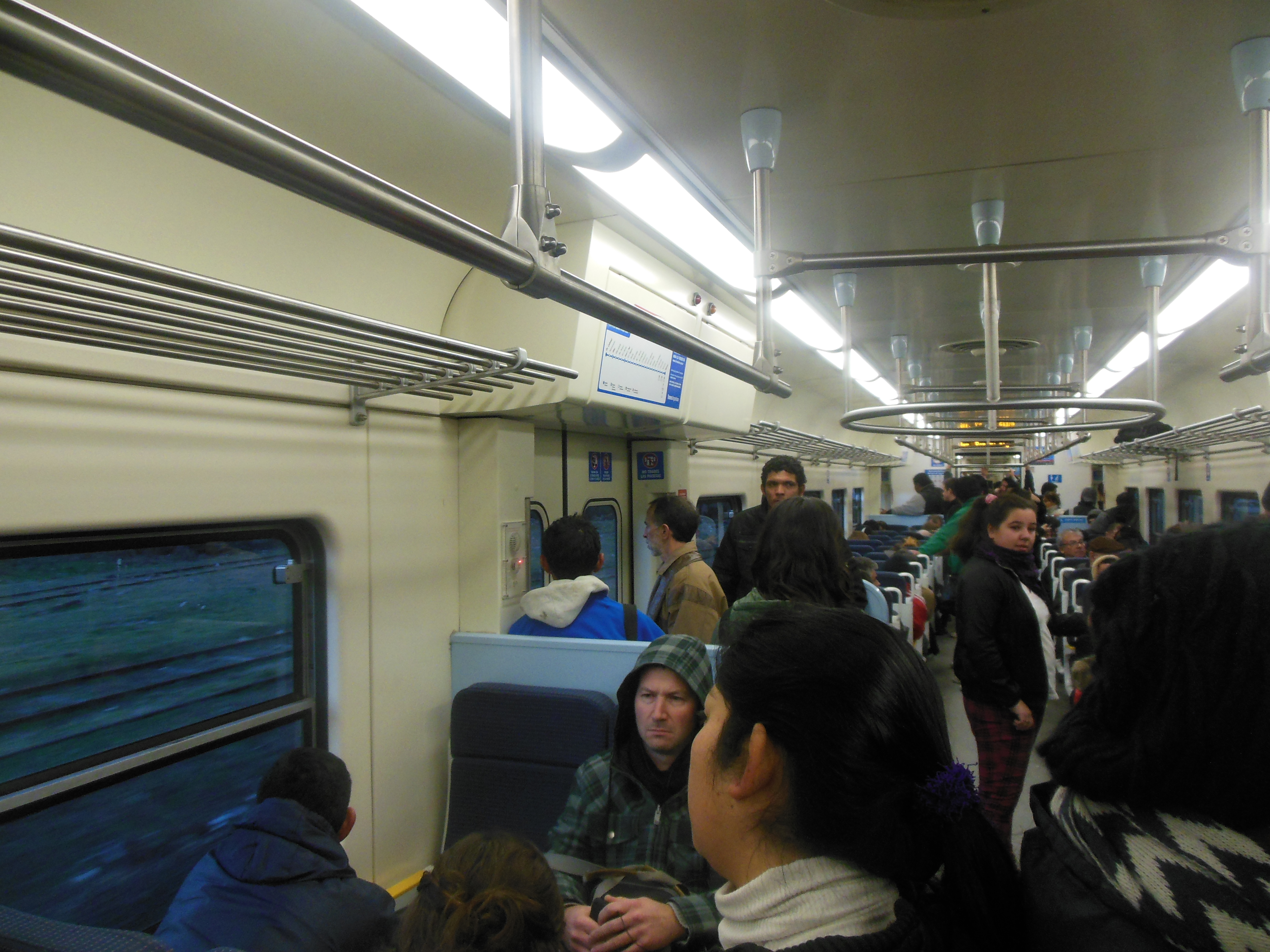 Interior de una formación de origen chino